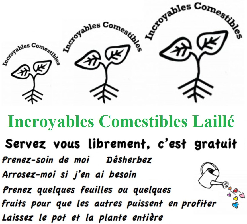 Affiche au jardin commun de Laillé